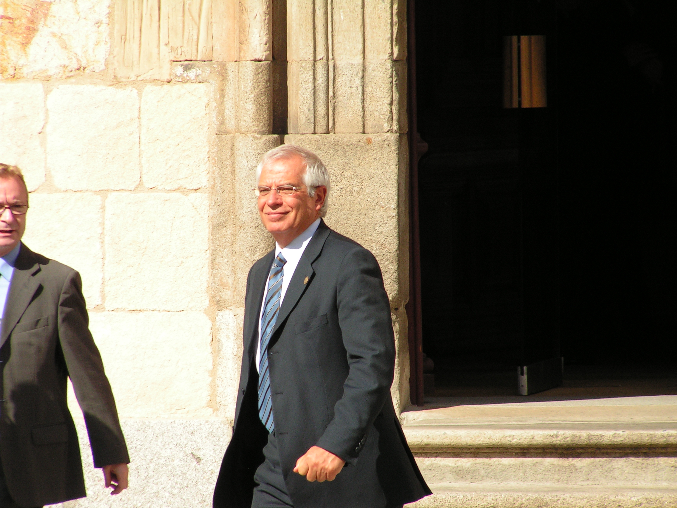 Josep Borrell, presidente del Paramento Europeo, en la XV Cumbre Iberoamericana que tuvo lugar en Salamanca (España), en octubre de 2005.